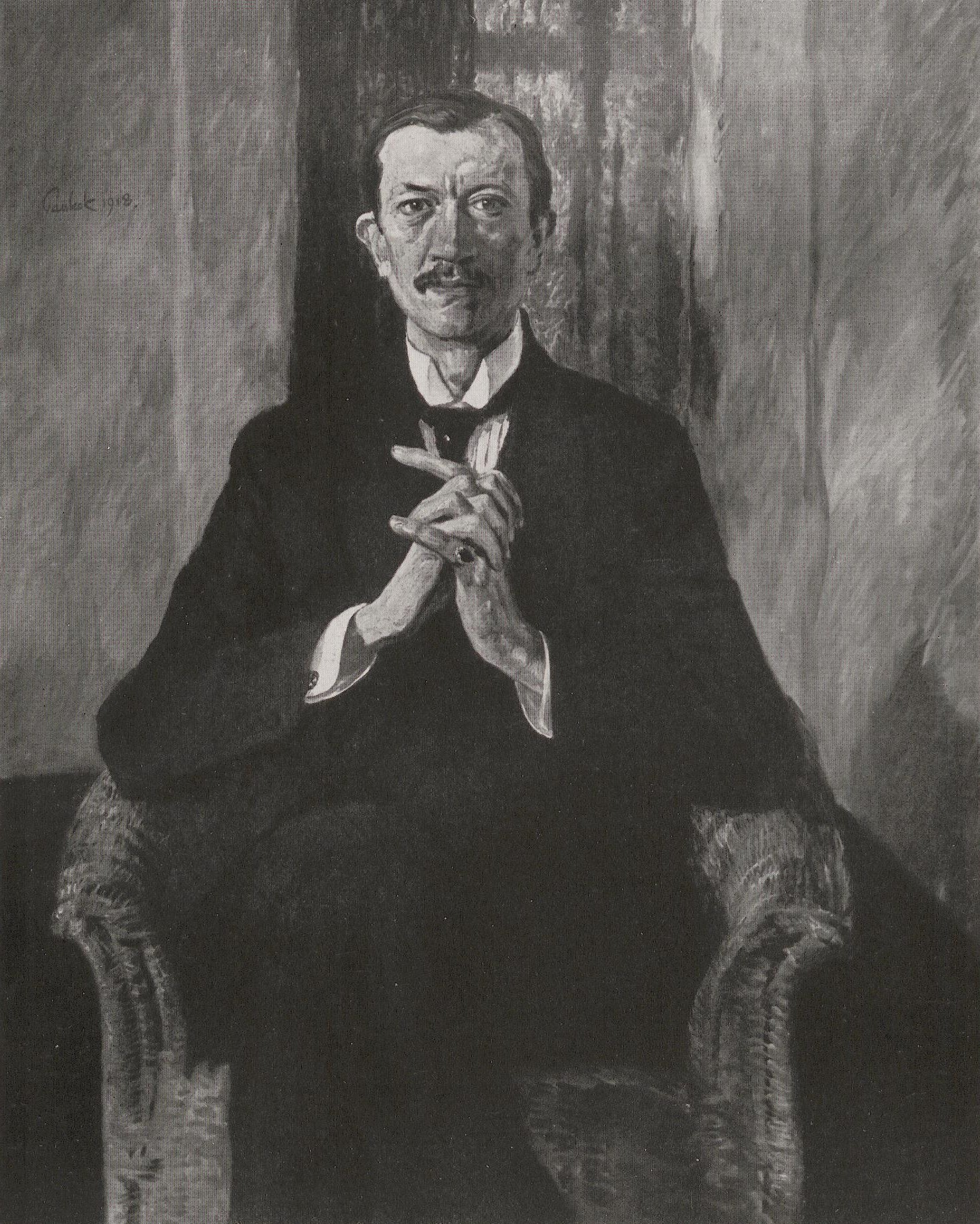 Bernhard Pankok - Bildnis Ernst Osthaus, 1918